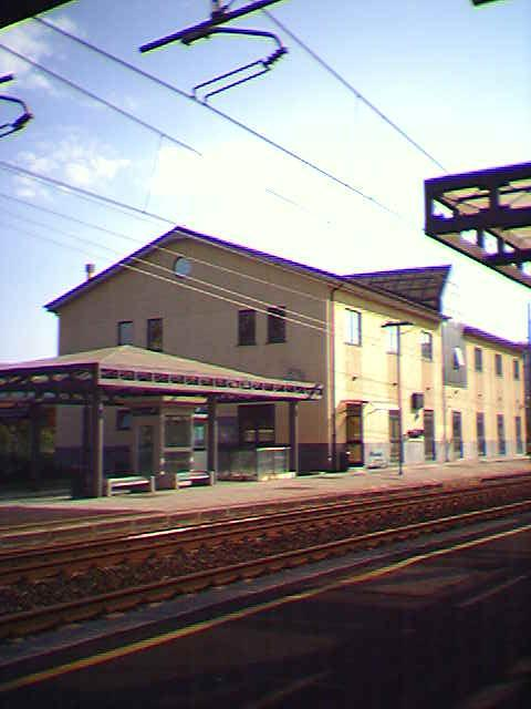 Stazione Ferroviaria La Spezia Migliarina- La Spezia - Italia